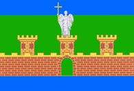 Bandera de Labinsk (krai de Krasnodar), Rusia.